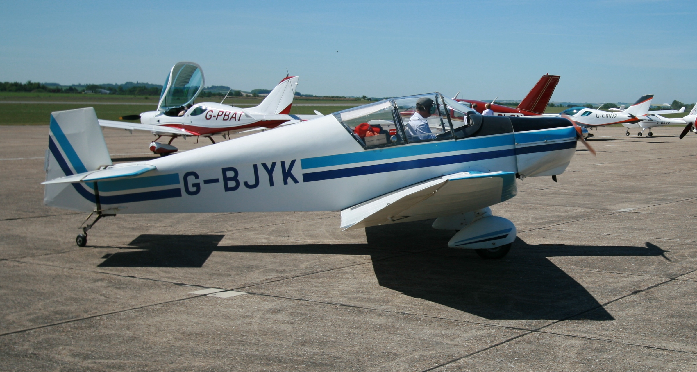 Jodel D 120 A G-BJYK